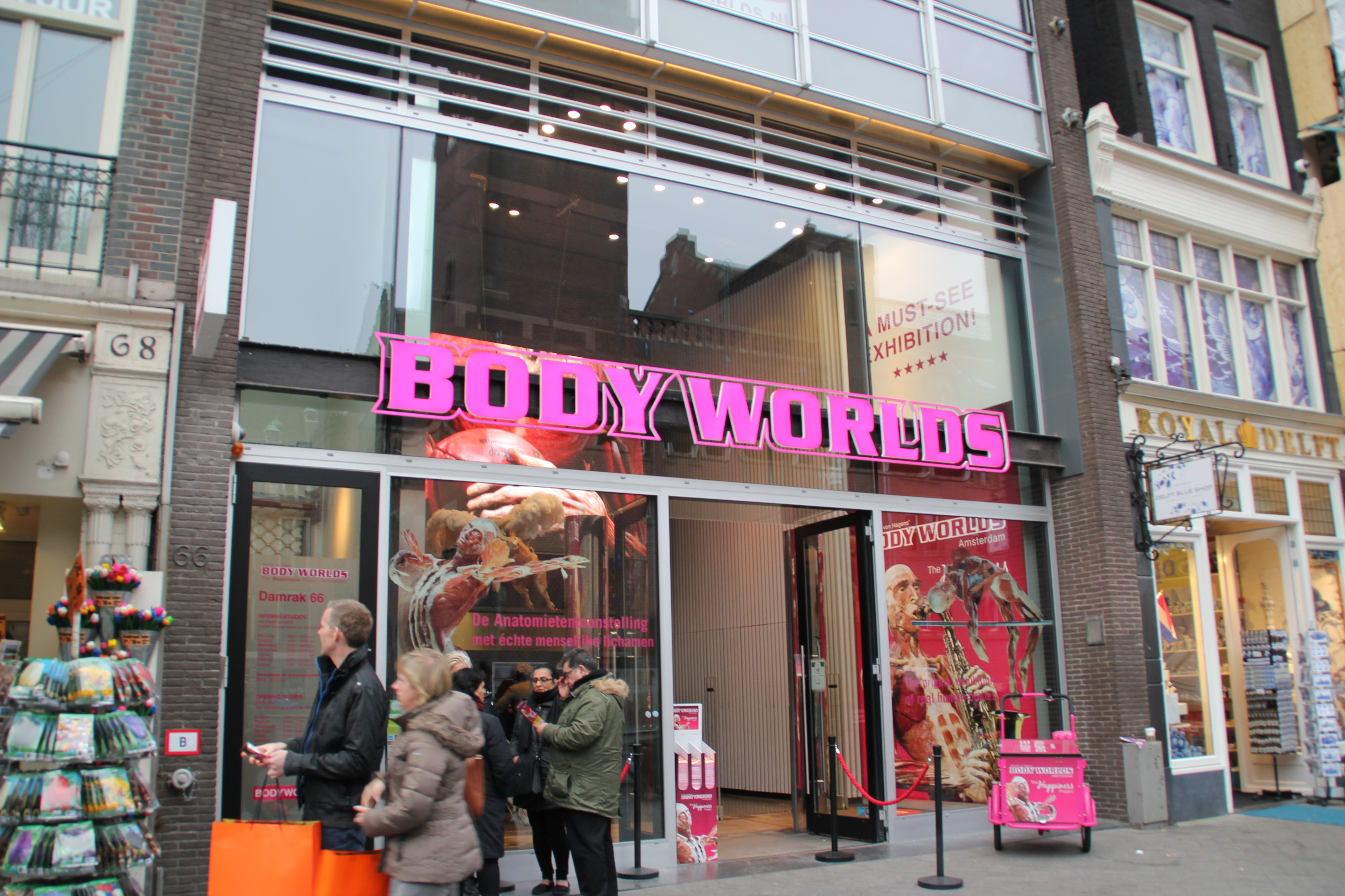 Body Worlds Amsterdam